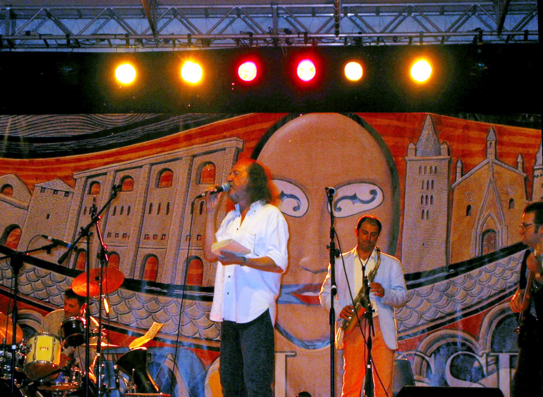 Claudio Lolli in concerto con Il parto delle nuvole pesanti.